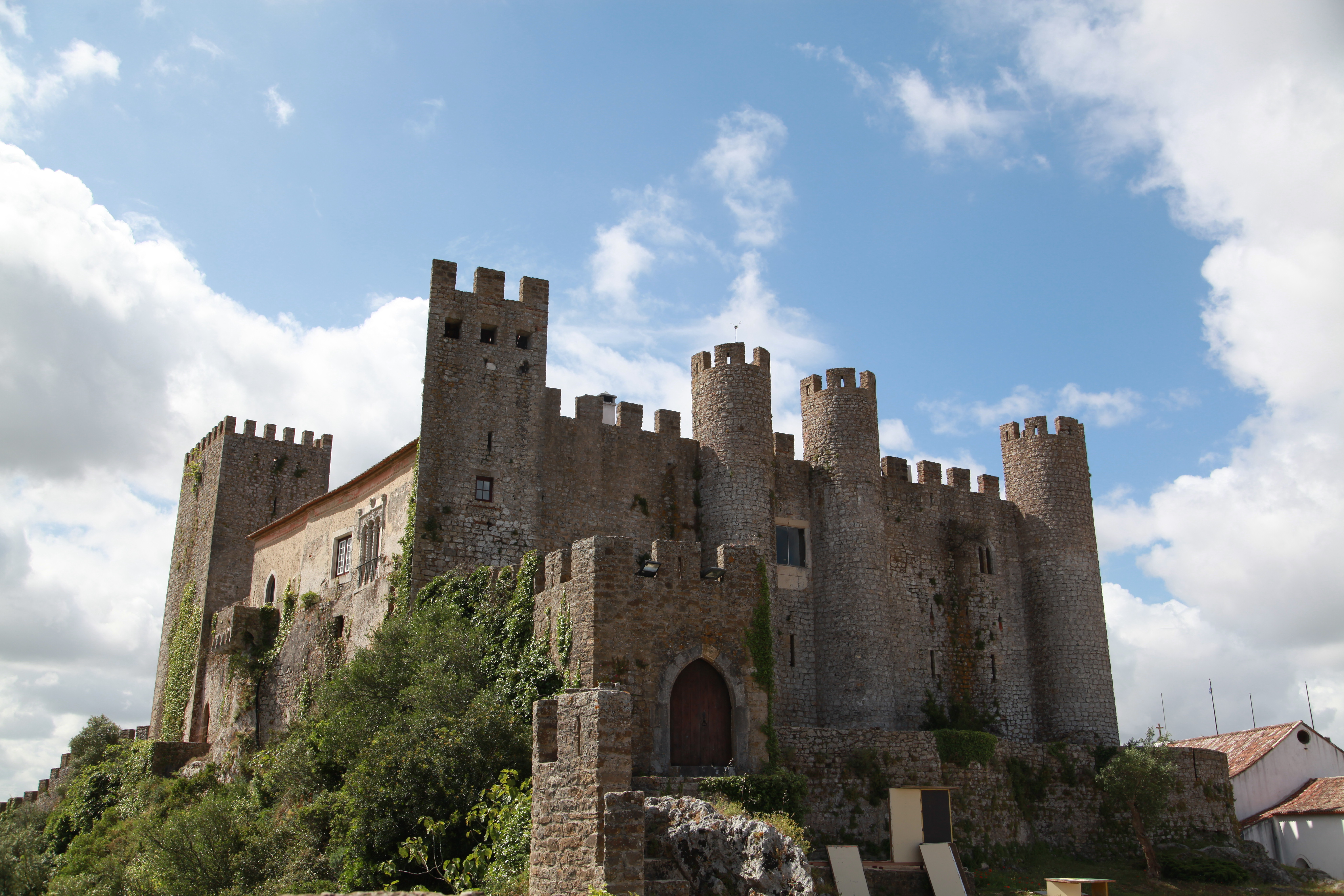 Obidos